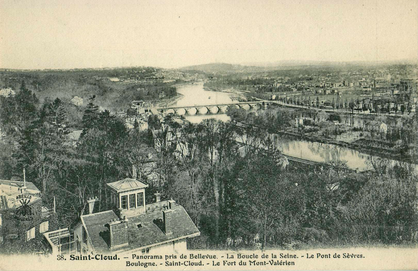 Carte postale ancienne éditée par Abeille, n°38 :SAINT-CLOUD - Panorama pris de Bellevue - La Boucle de la Seine - Le Pont de Sèvres - Boulogne - Saint-Cloud - Le Fort du Mont-Valérien